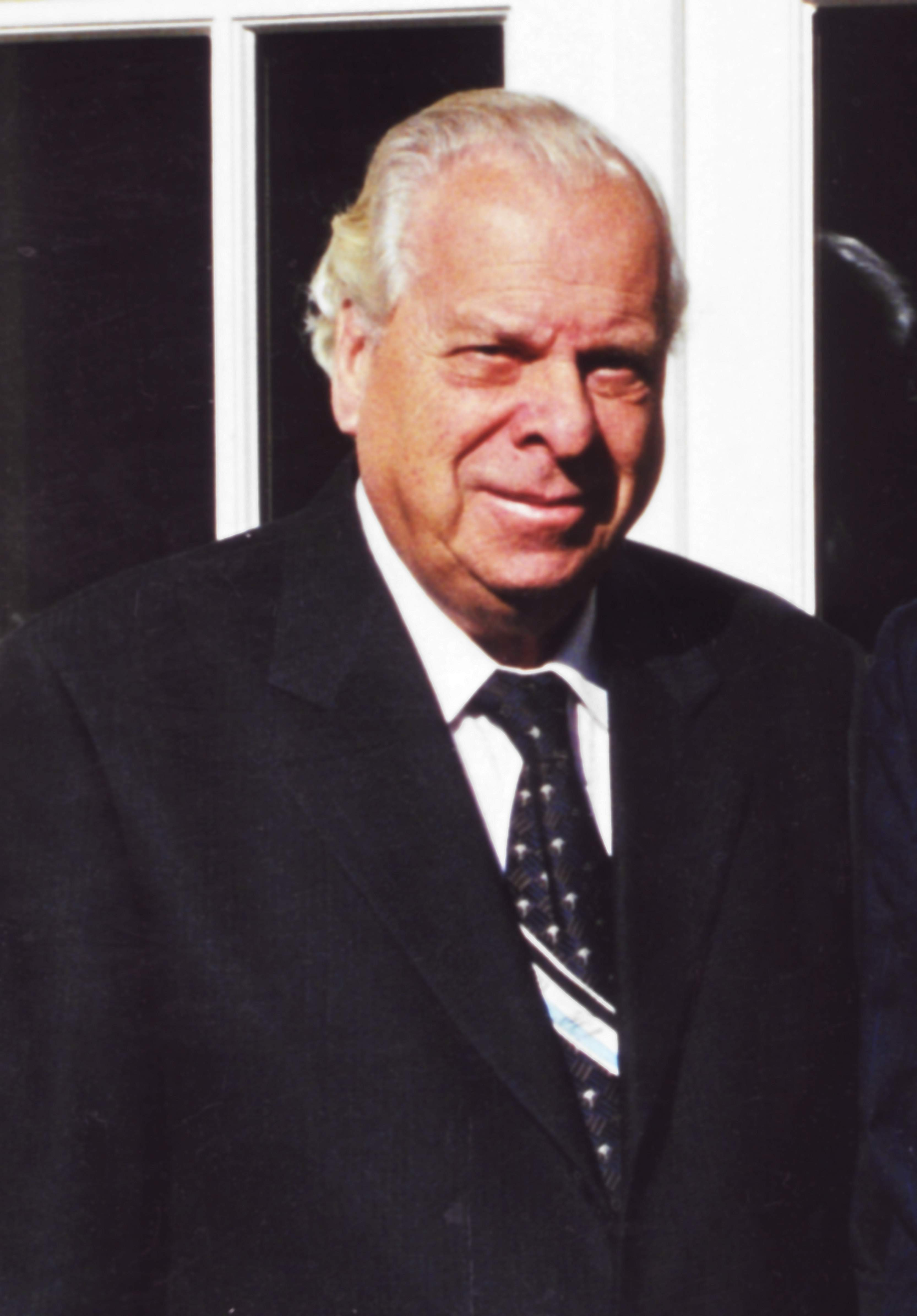 Fotografie des Rechtsmediziners Prof. Dr. Steffen Berg bei einem Herrenessen auf dem Corpshaus von Suevia München, Werneckstr. 6